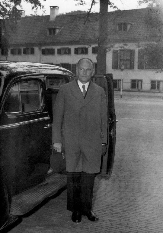 Koningin Juliana ontvangt fractieleiders waaronder deze M. van der Goes van Naters van de PvdA voor besprekingen over de kabinetscrisis, Nederland ca.1948.